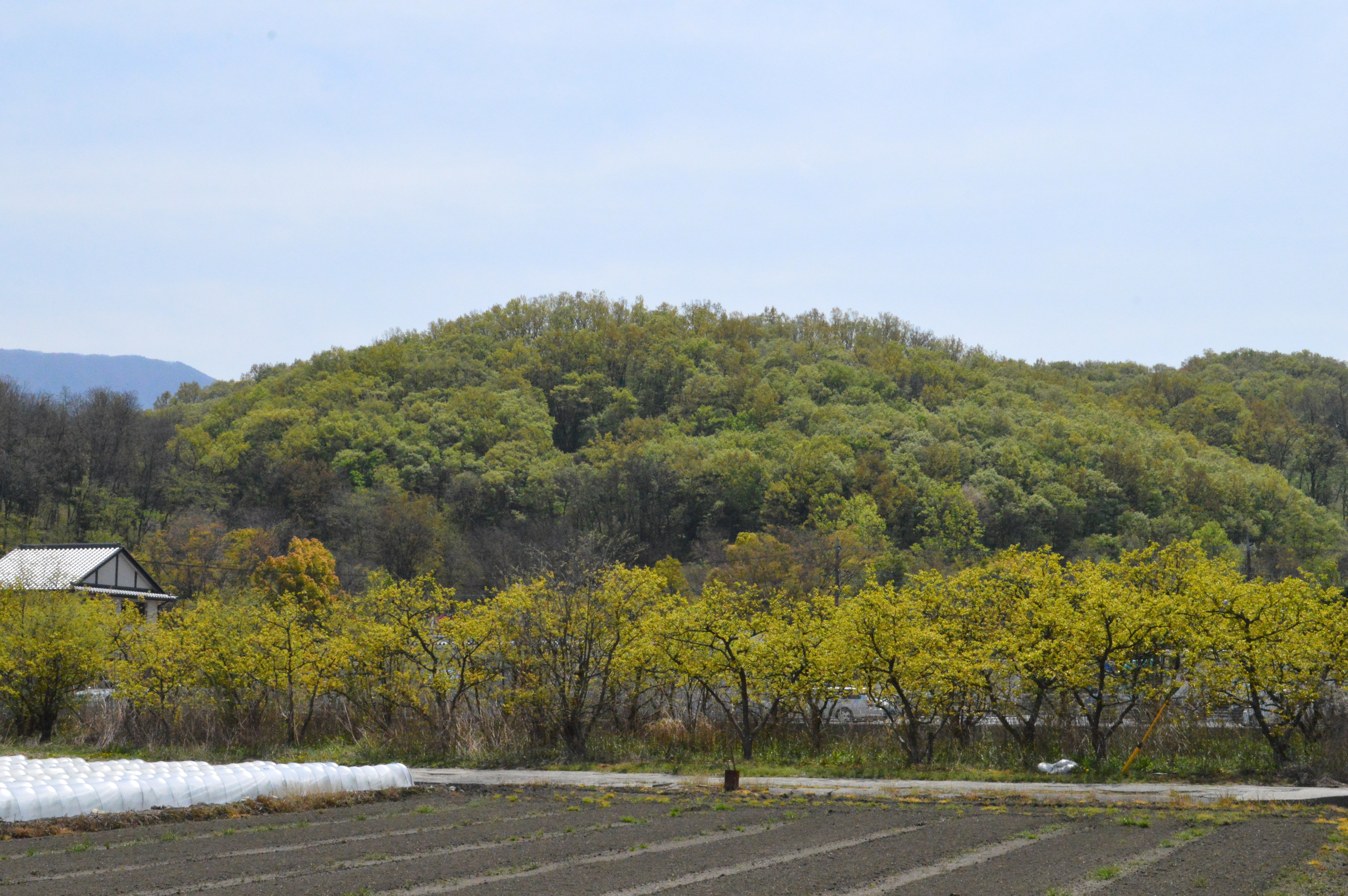 大丸山古墳 遠景 (山頂付近に所在)